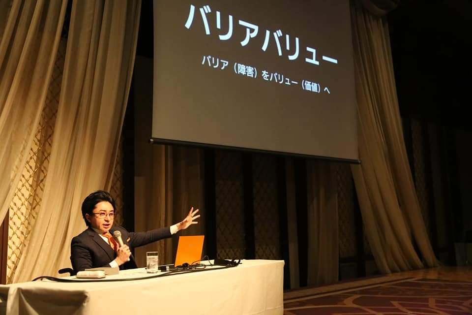 ホテル阪急インターナショナルにて